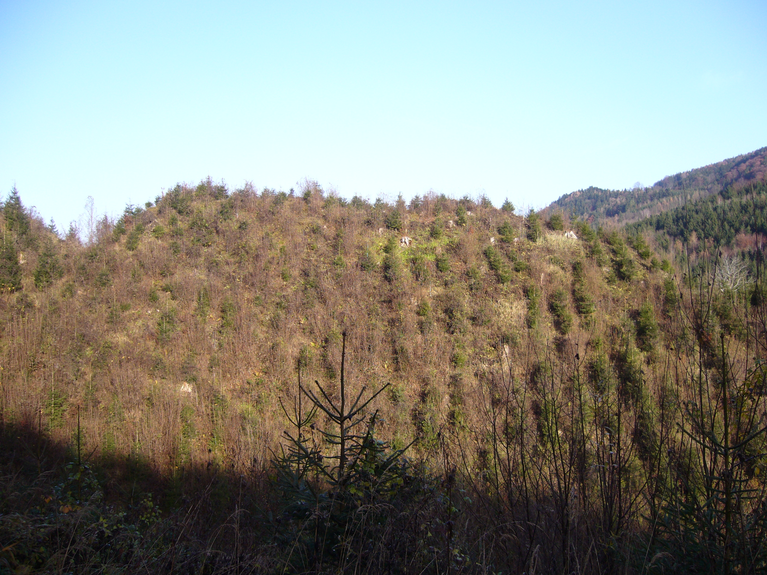 burgberg der ruine liebegg in scheibbs neubruck